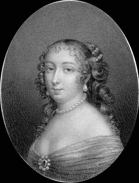 Marie-Madeleine de Vignerot d'Aiguillon